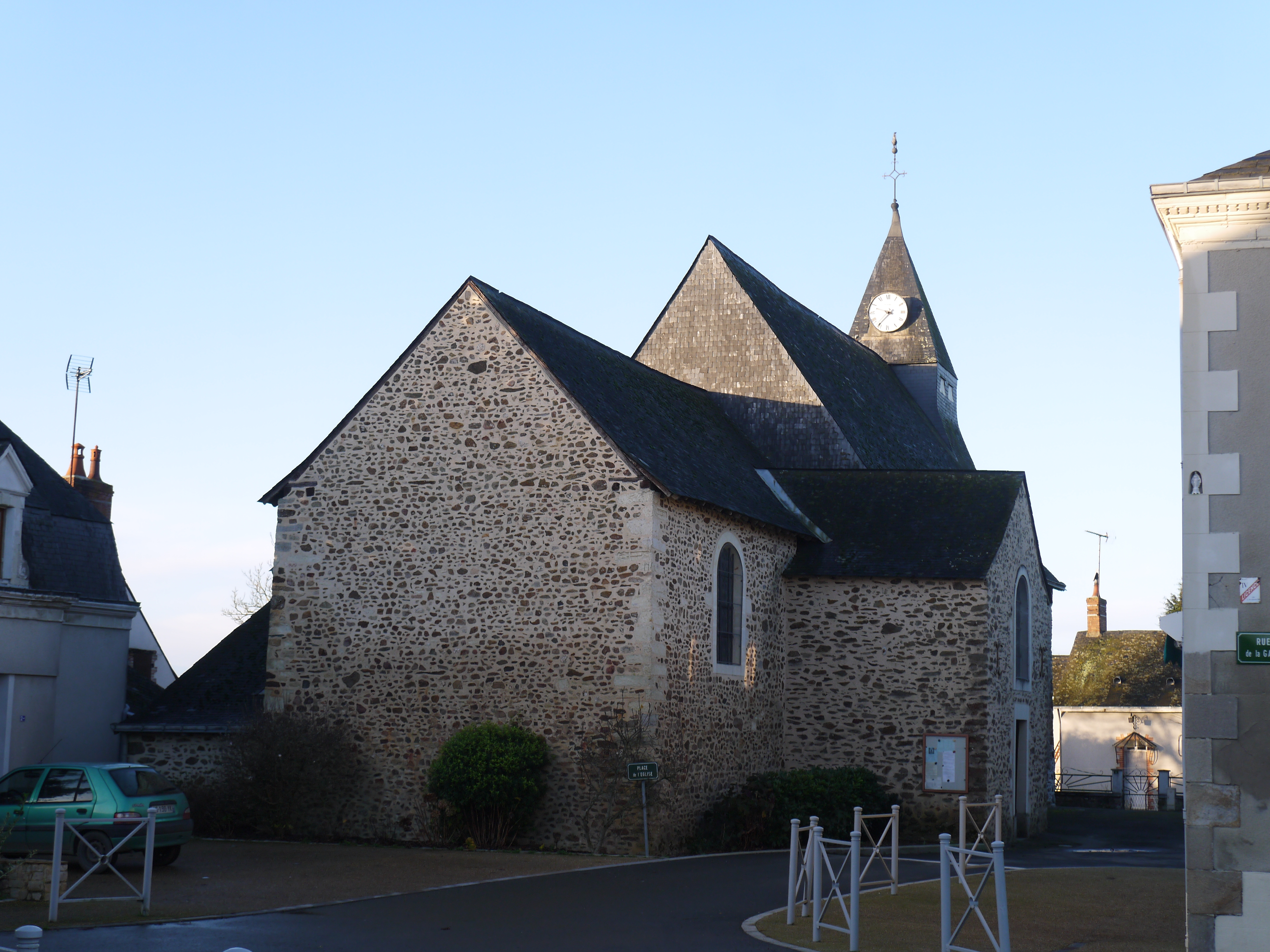 L'église de la Visitation.